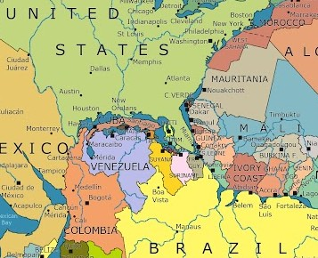 Detail pangea met politieke grenzen